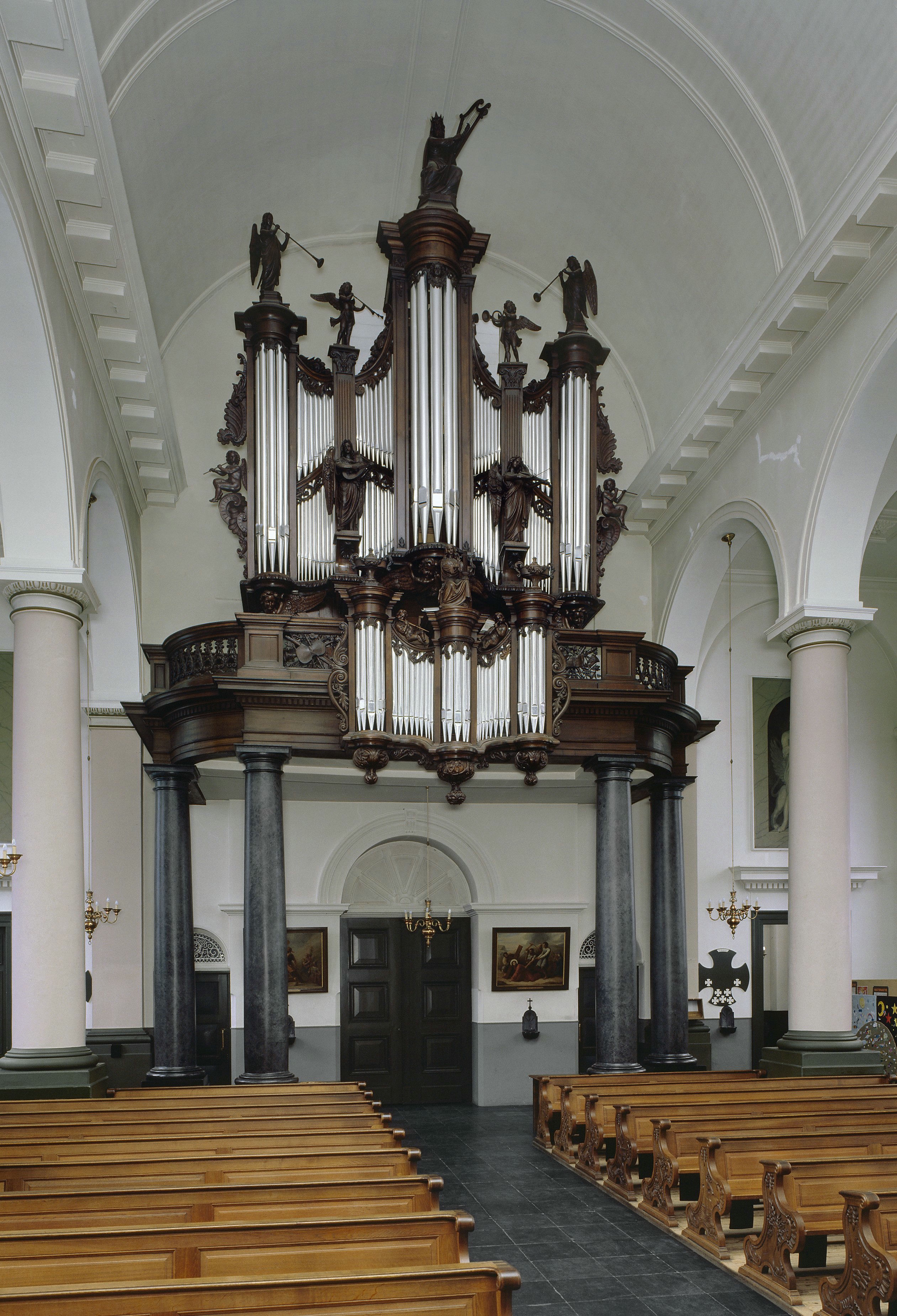 Sint Lambertuskerk: Interieur, aanzicht orgel, orgelnummer 1487 (opmerking: Gefotografeerd voor Het Historische Orgel in Nederland 1865-1872)